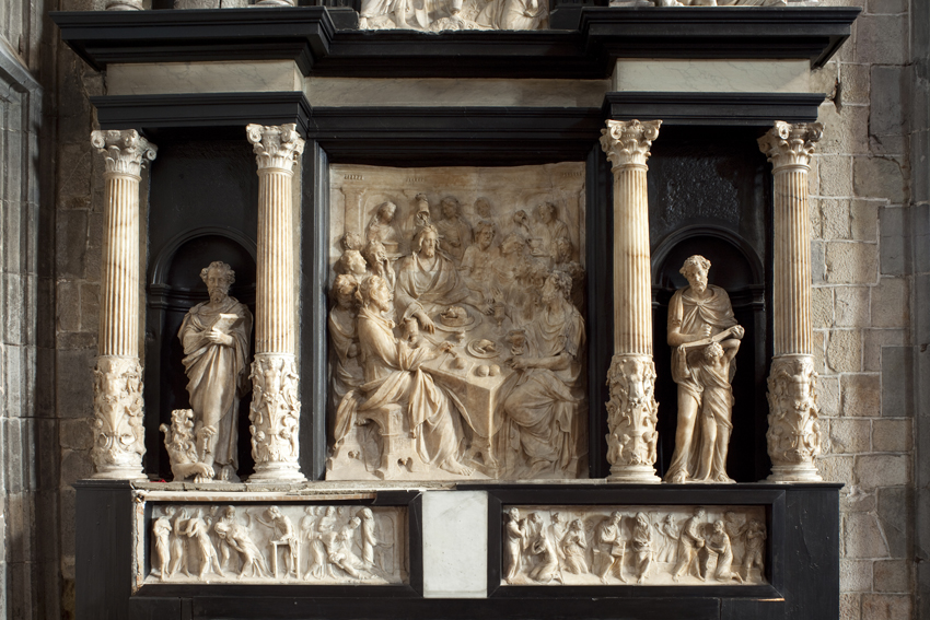 Jacques Du Brœucq, Le retable de Sainte-Marie Madeleine, 1550